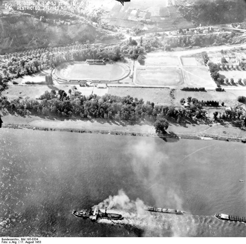 Rheinbefliegung der Alliierten 1953